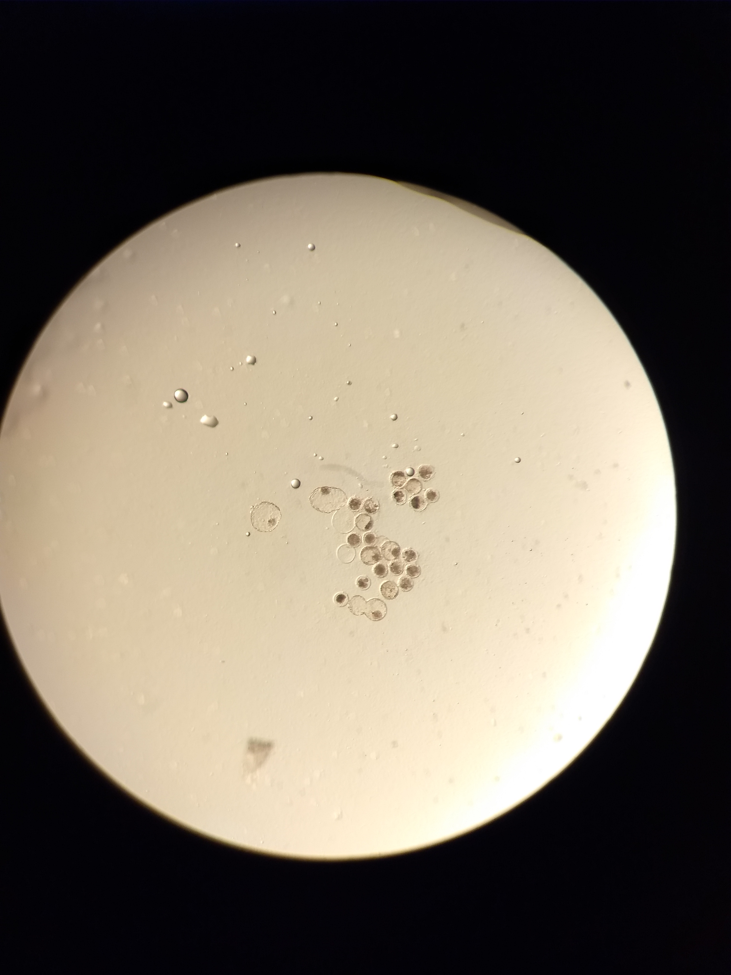 Embriões bovinos em sétimo dia de cultivo in vitro.